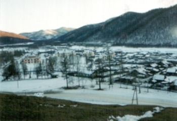 Зимний Холтосон